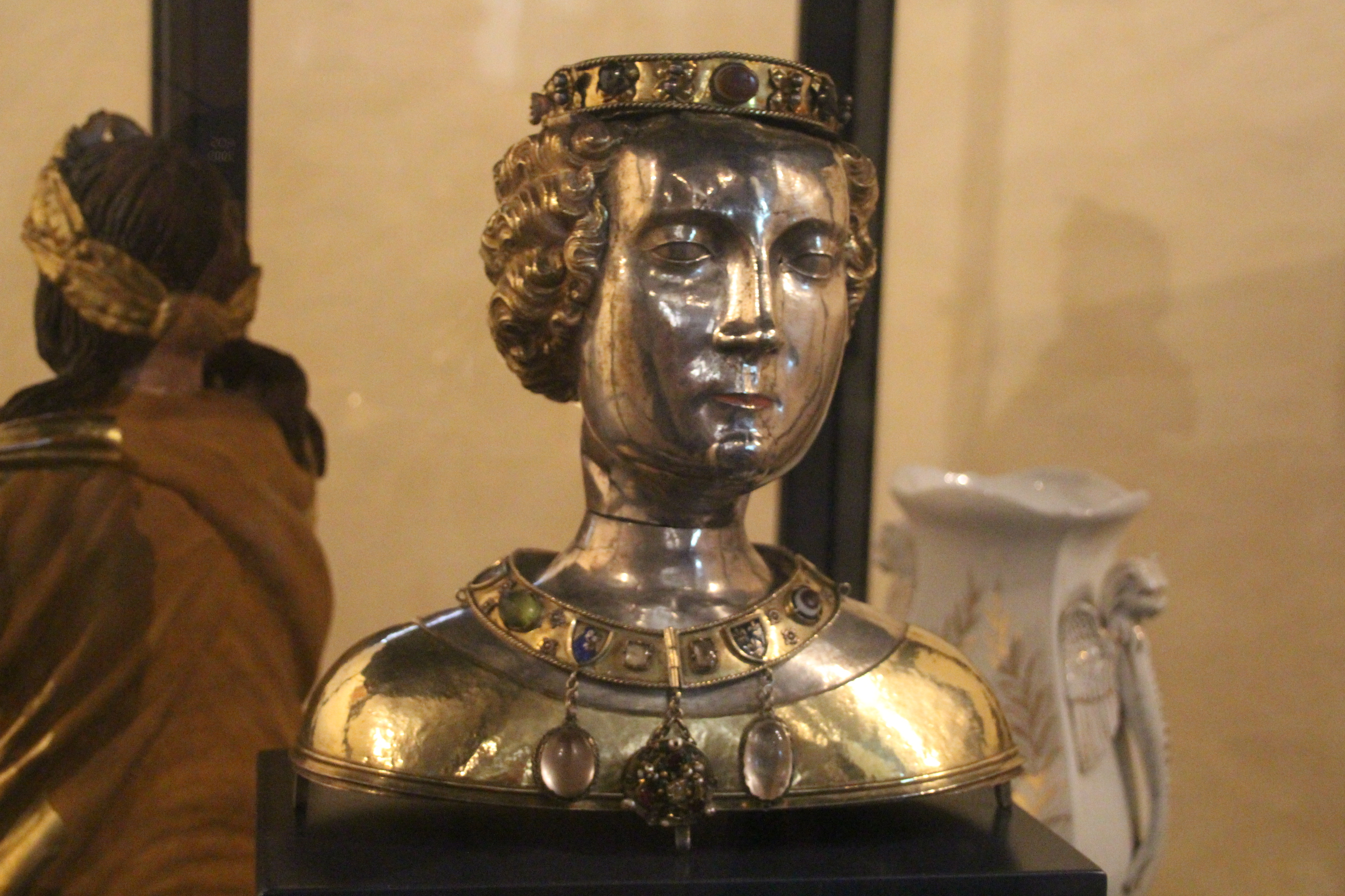 Abbatiale Sainte-Valérie de Chambon-sur-Voueize - reliquaire